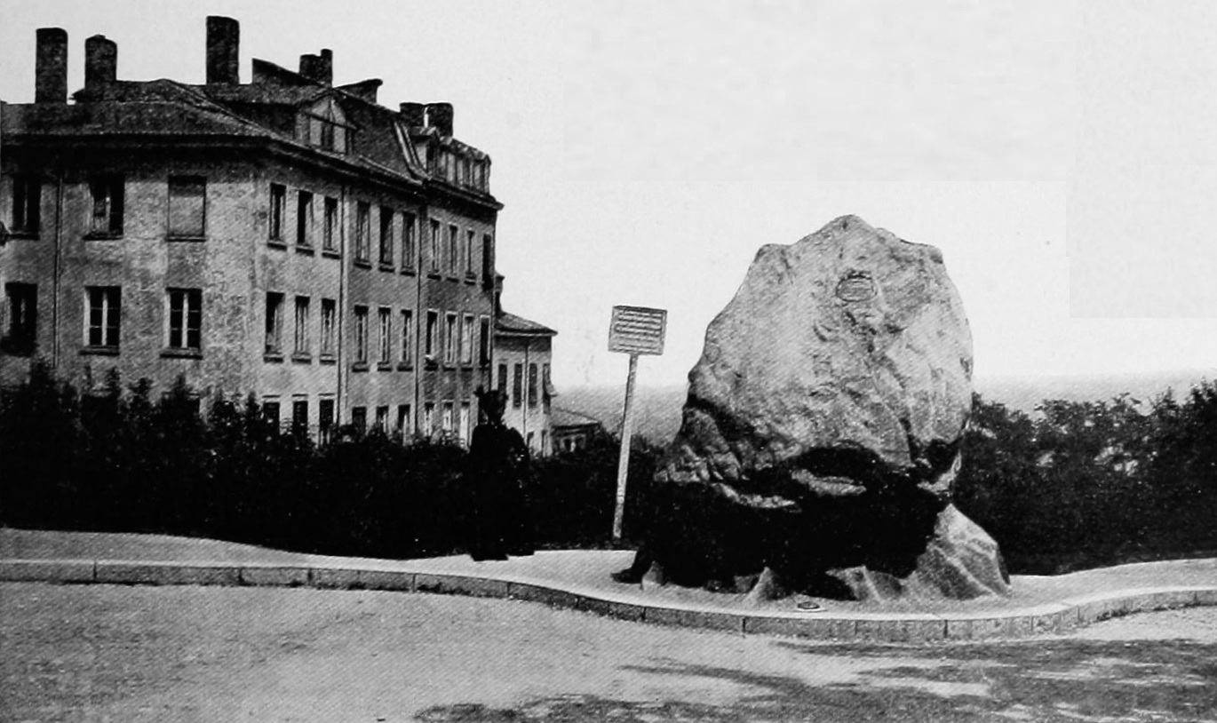 Dictionnaire illustré des communes du département du Rhône. Tome 2 / par MM. E. de Rolland et D. Clouzet.